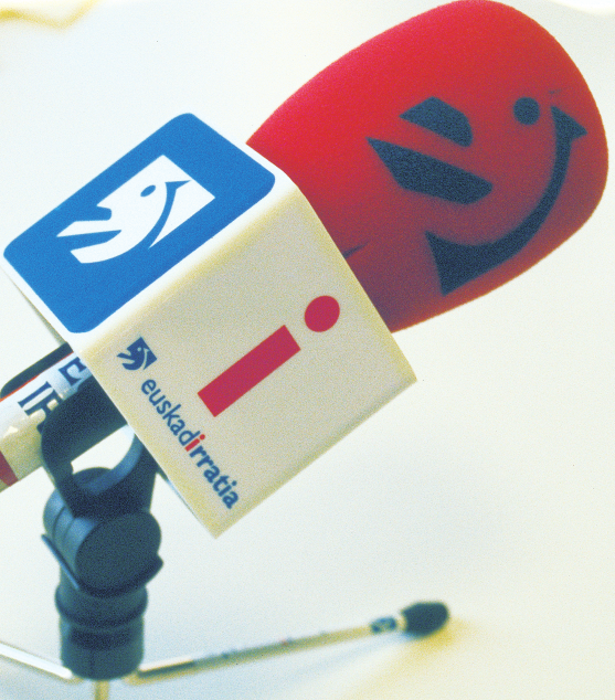 Euskadi Irratia